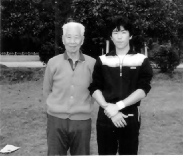 温 敬銘老師と宮平氏（1984年。武漢体育学院にて）